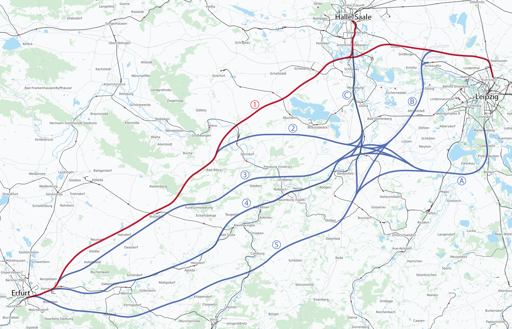 Karte der NBS Erfurt–Leipzig/Halle; Varianten der Vorplanung